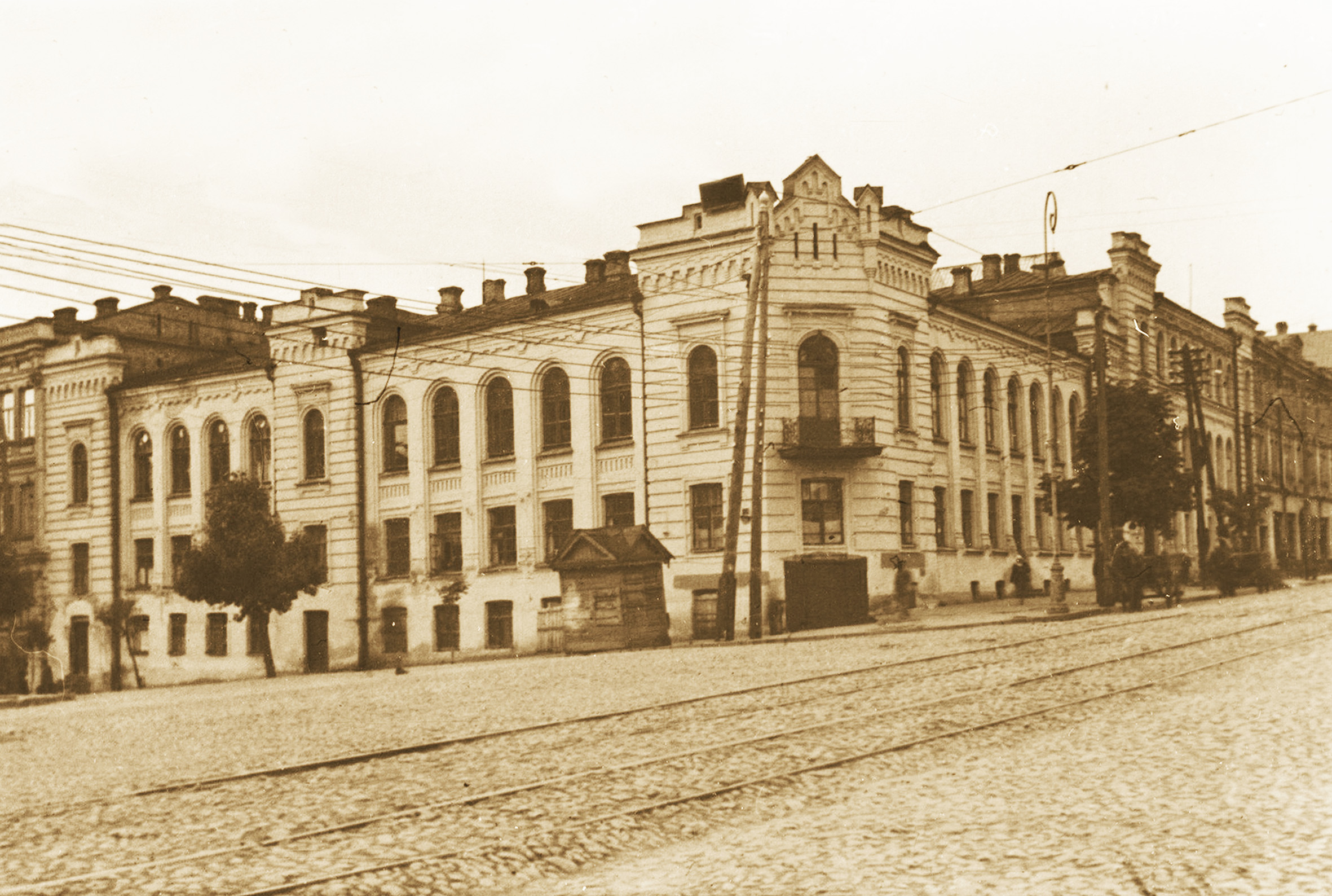 Будинок прибутковий купця Ф. Міхельсона, Київ, вул. Володимирська, 23/27